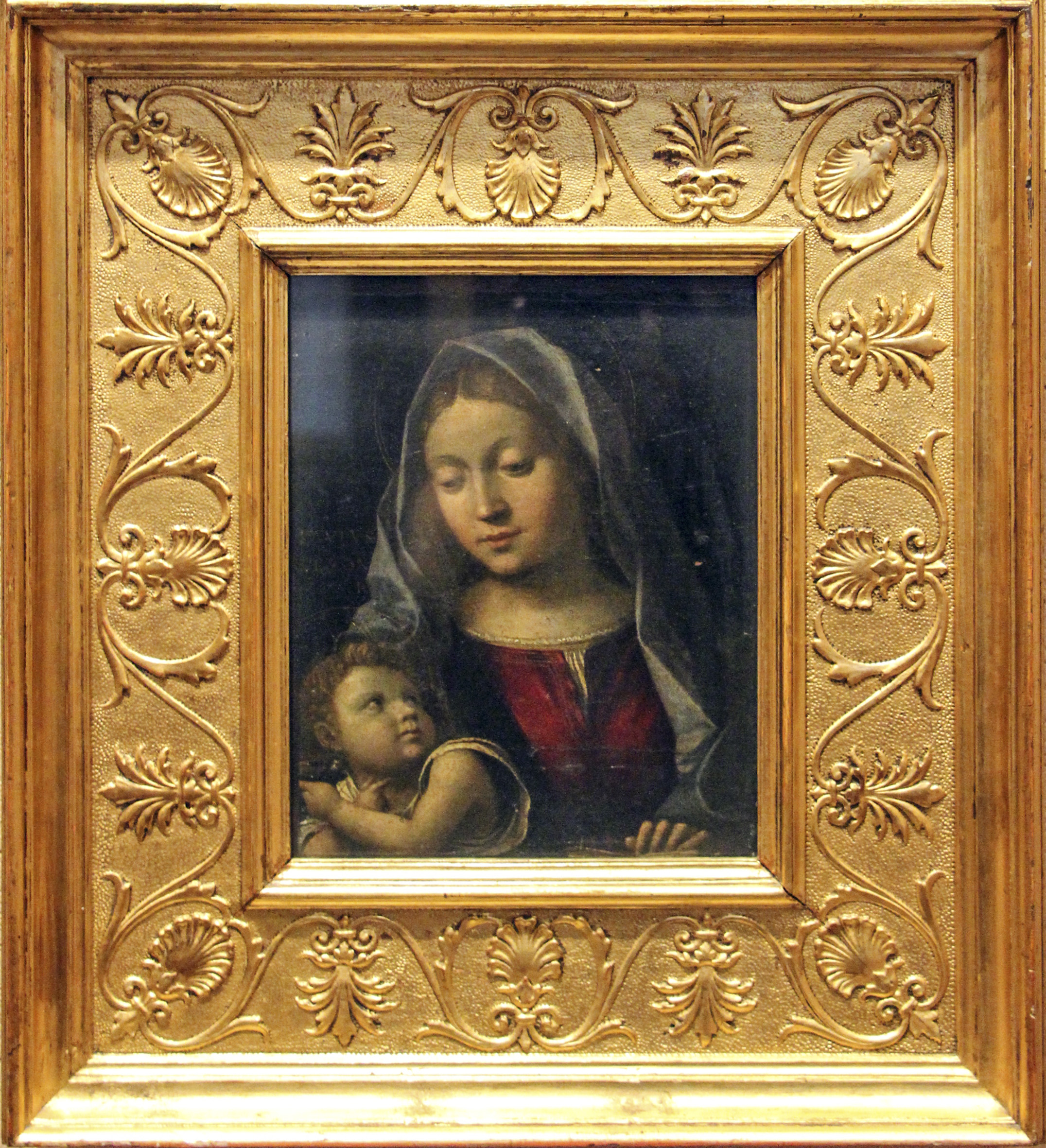 Museo Poldi Pezzoli (Milano)